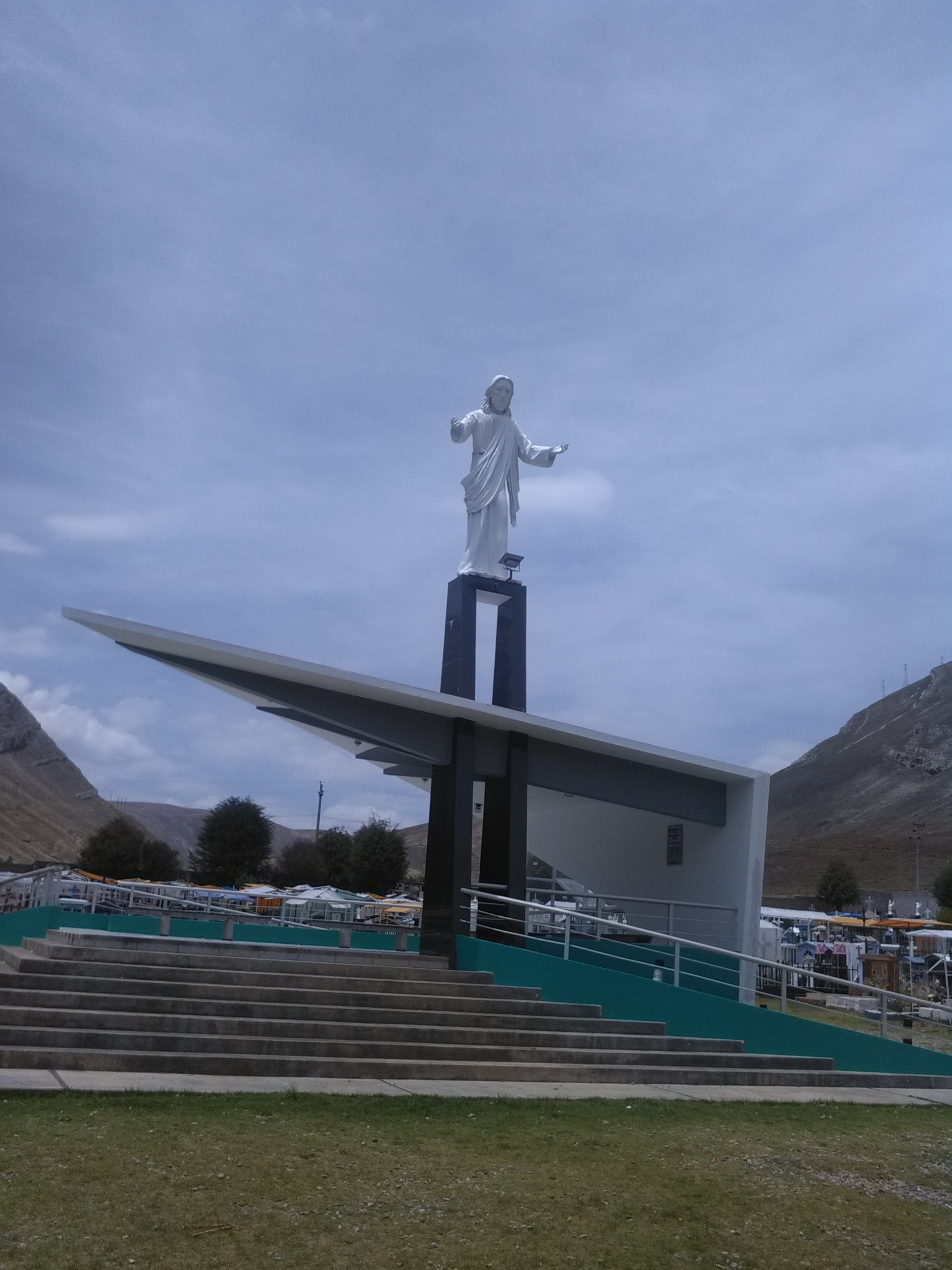 osario ubicado en ciudad de la oroya